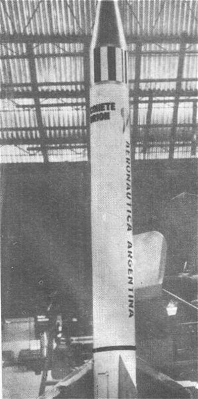 Cohete sonda Orión I.